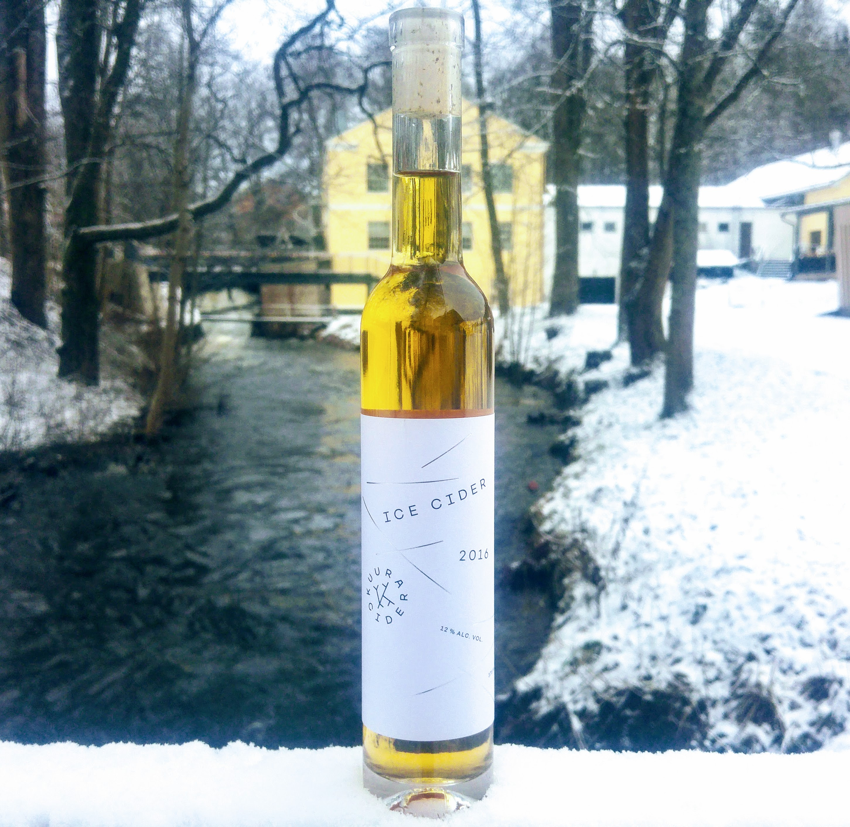 Jääsiideri